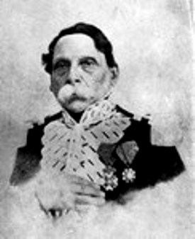 Il generale Francesco Traversa